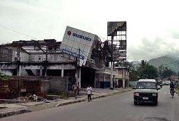 Zerstörungen in Dili im Oktober 1999